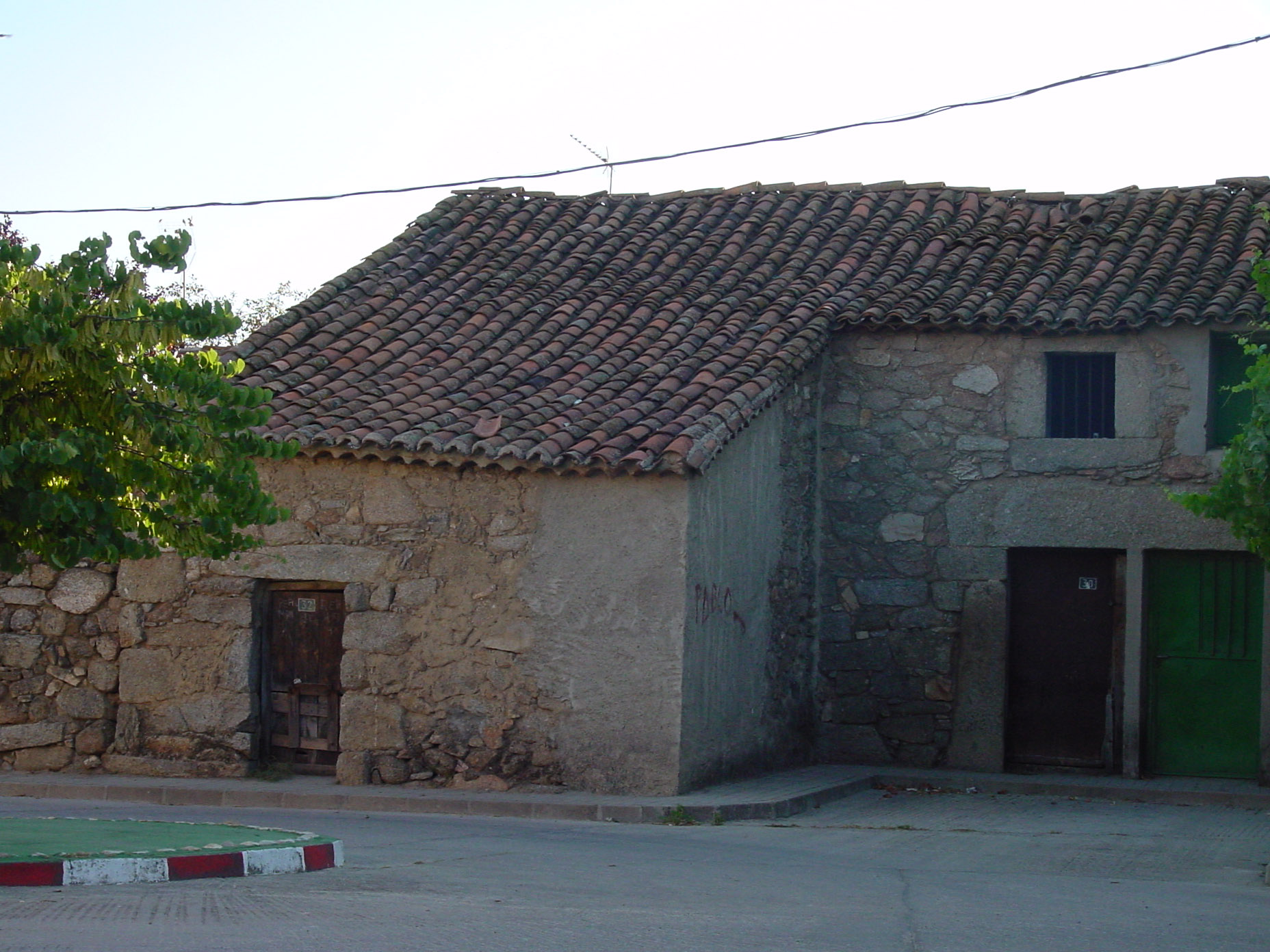 Casa de Cenicientos.